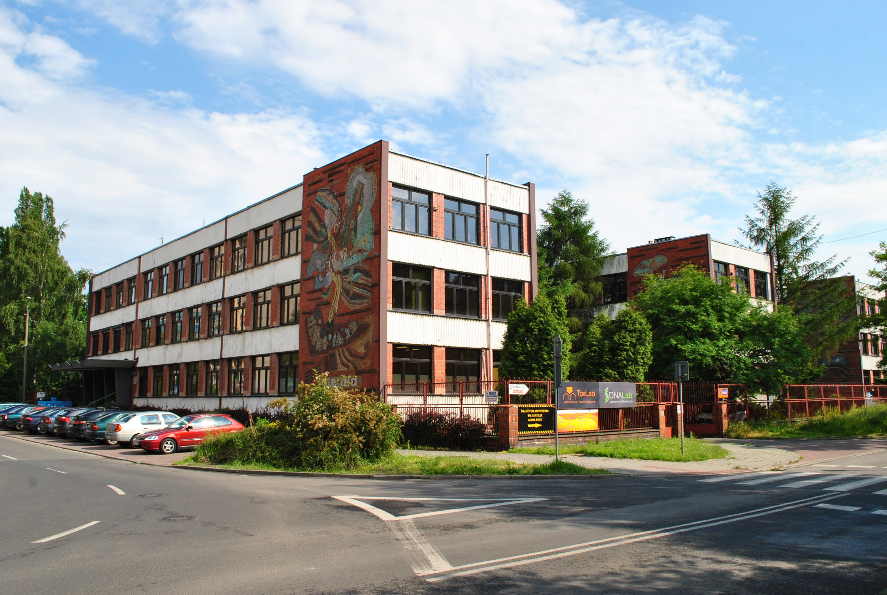 Katowice - Osiedle Witosa. Siedziba Instytutu Ekologii Terenów Uprzemysłowionych przy ul. Kossutha 6